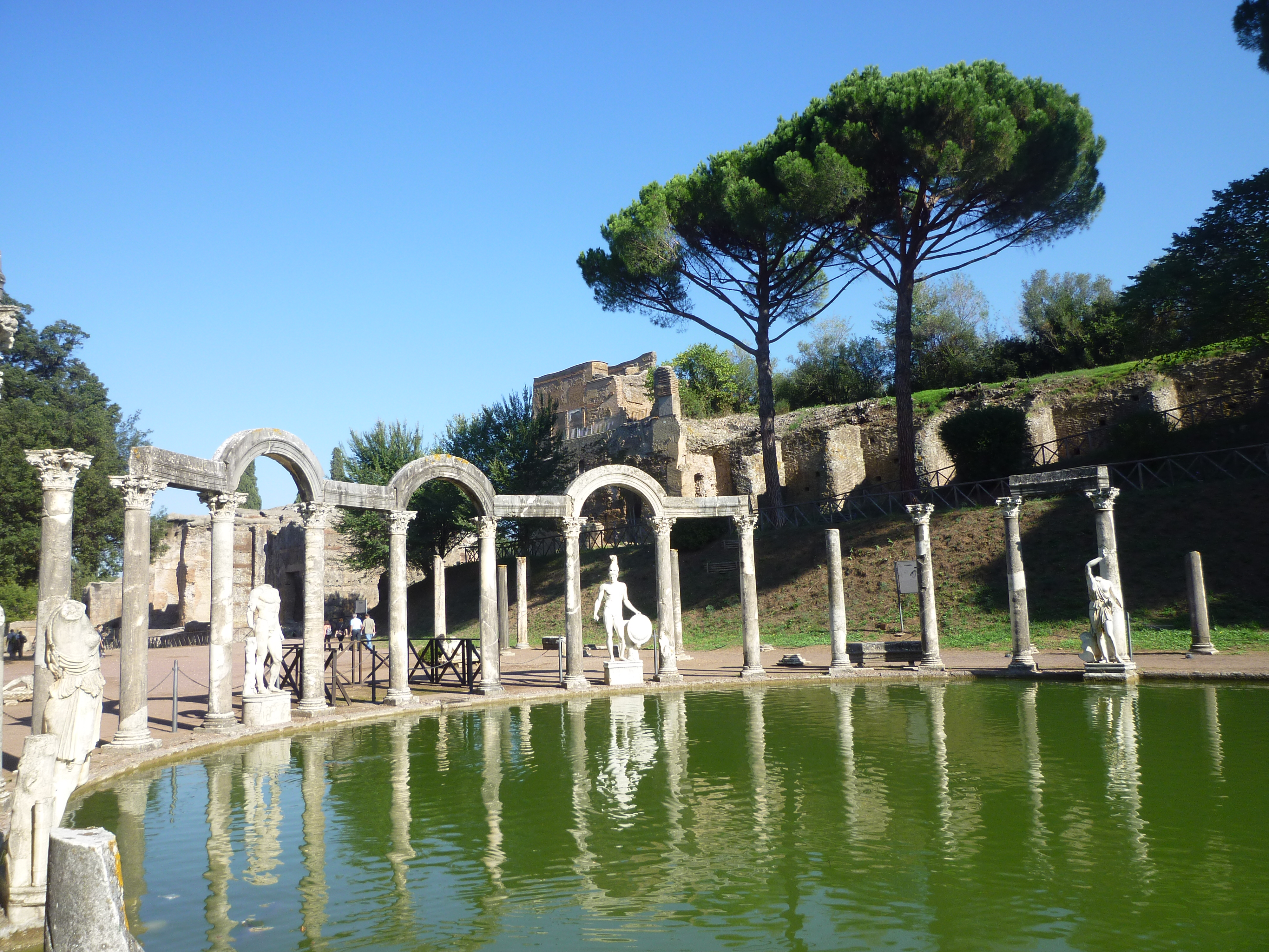 Tivoli, summer 2012